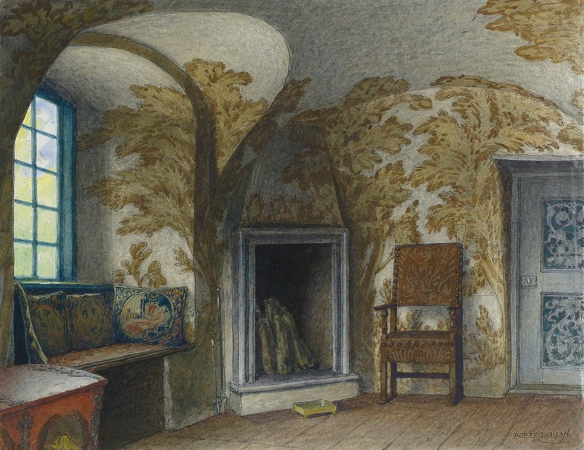 Rydboholms slott målning av Ferdinand Boberg